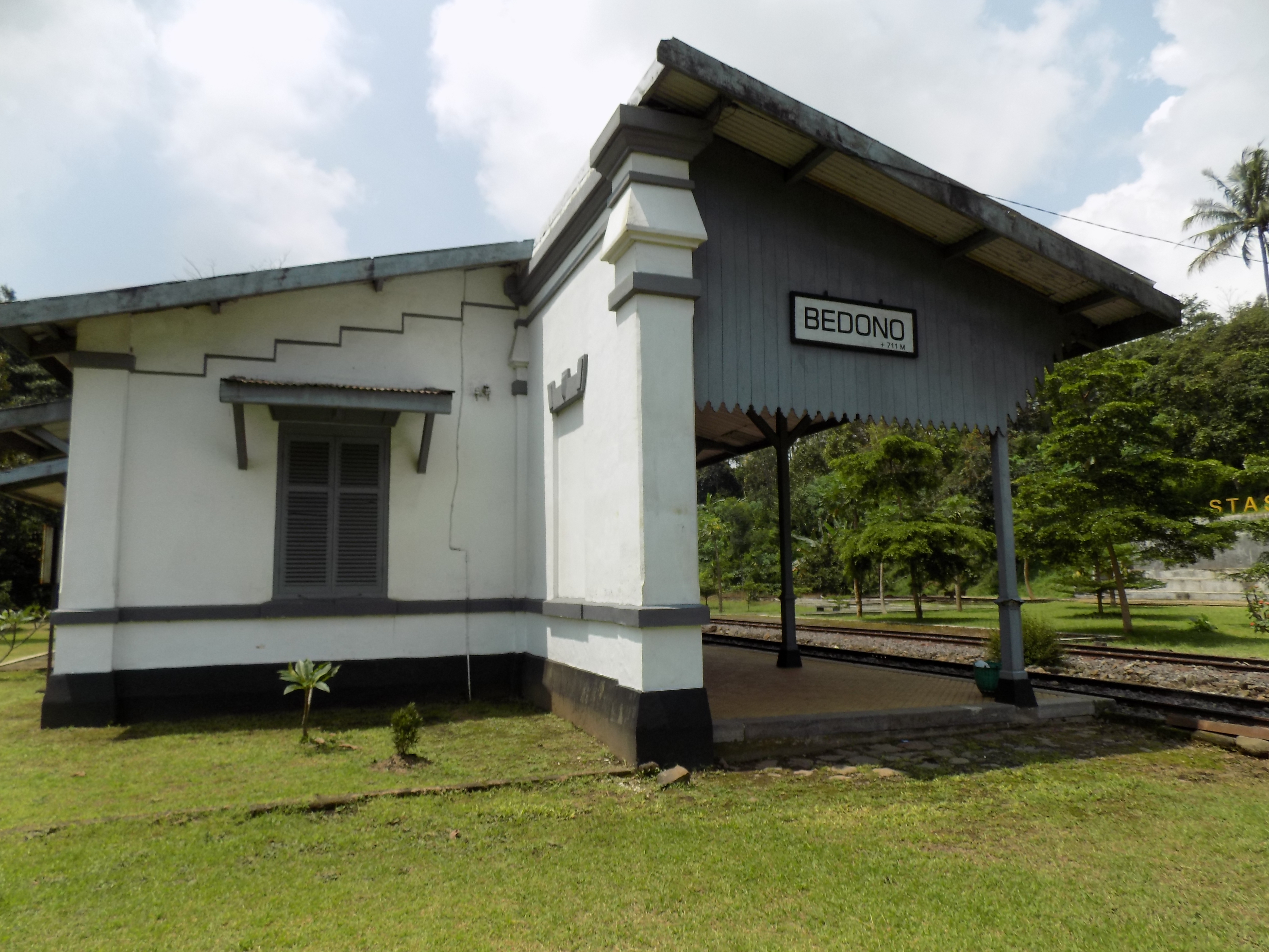 Stasiun Bedono